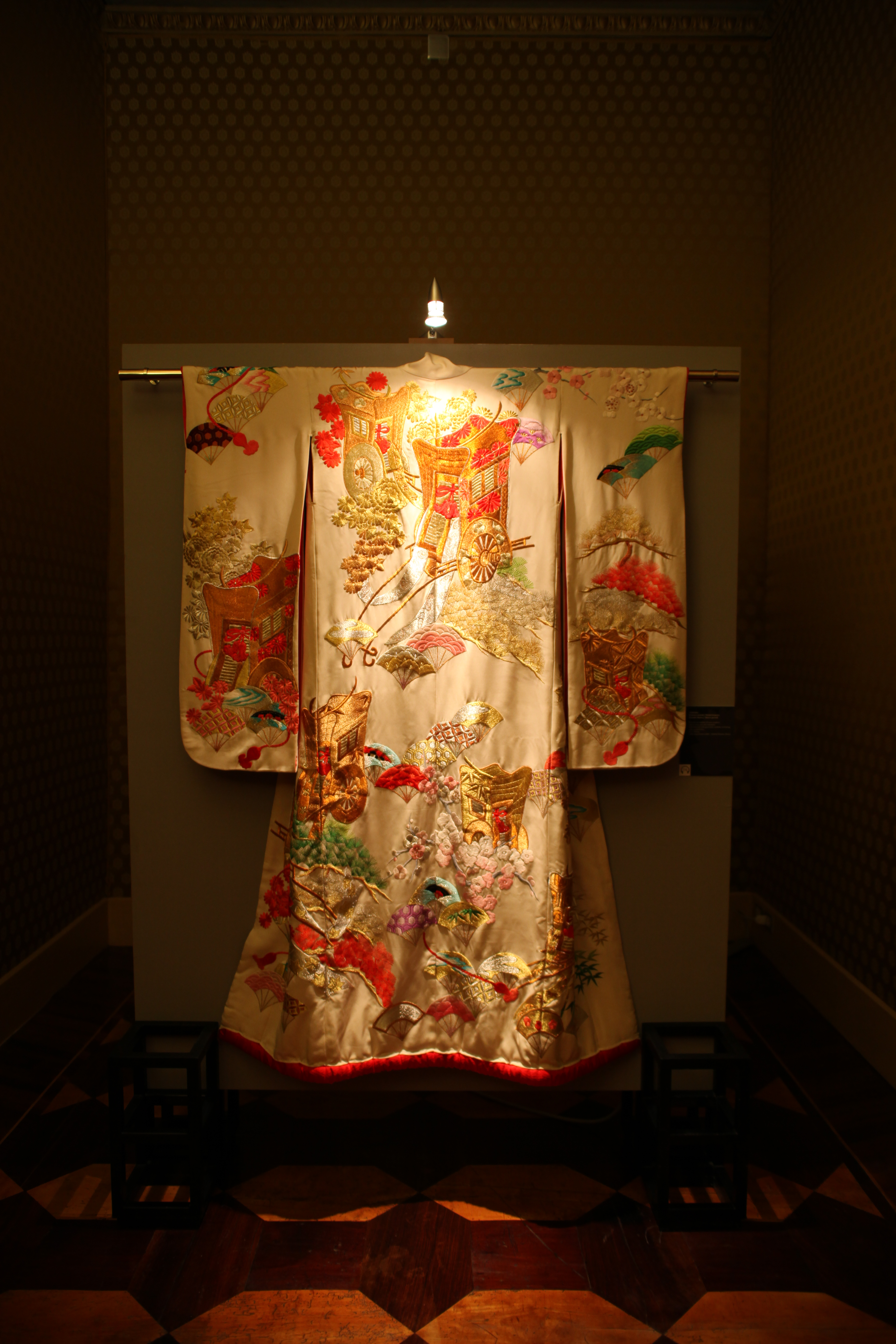 Kimono (Edo period) Shunga Arte ed eros in Giappone nel periodo Edo Palazzo Reale, Milano dal 21 ottobre al 31 gennaio